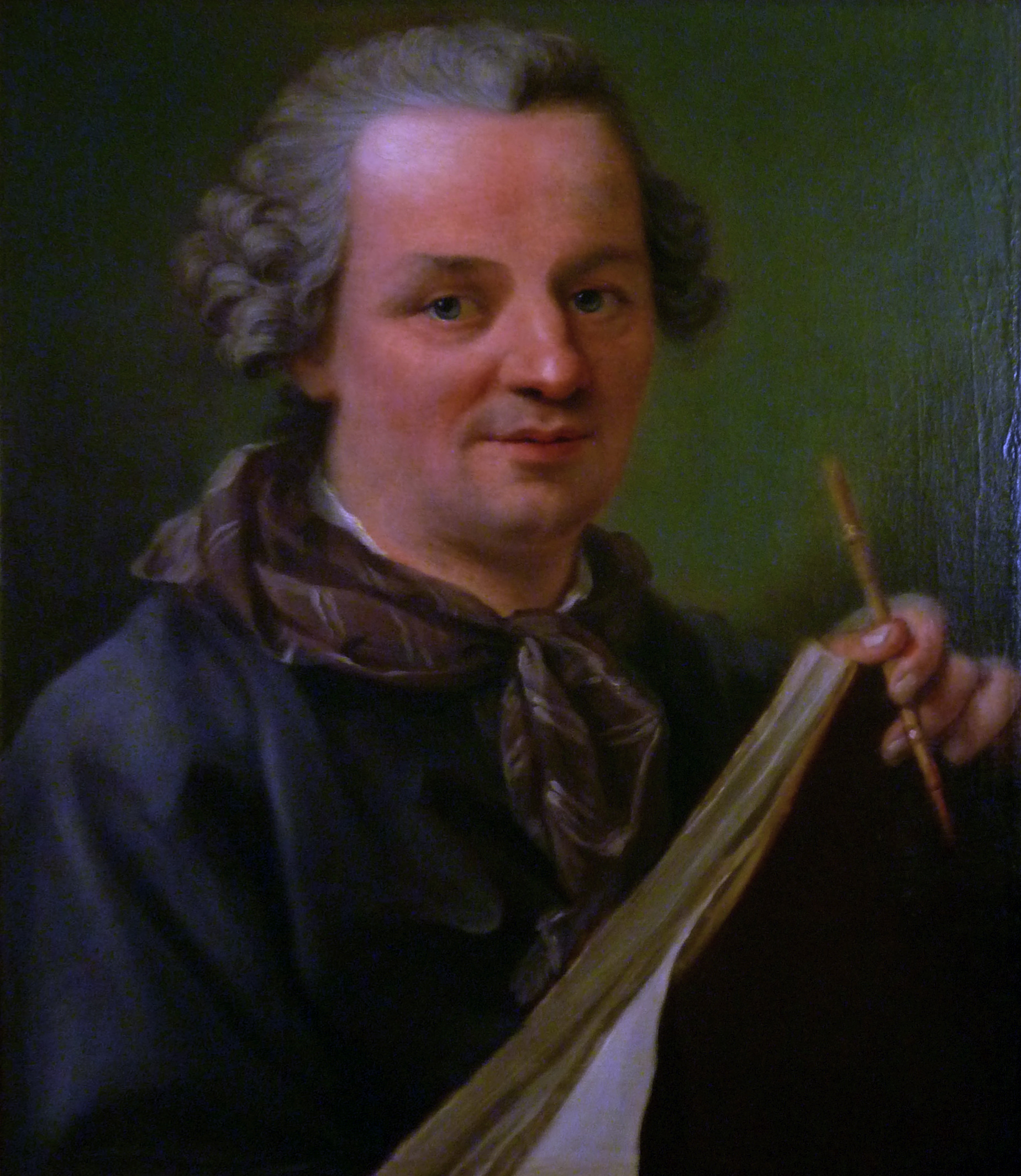 Portrait de l'artiste par lui-même